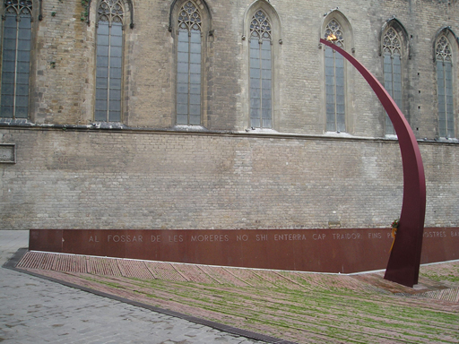 El Fossar de les Moreres, Barcelona, (Catalunya) - "Al fossar de les moreres no s'hi enterra cap traïdor ...